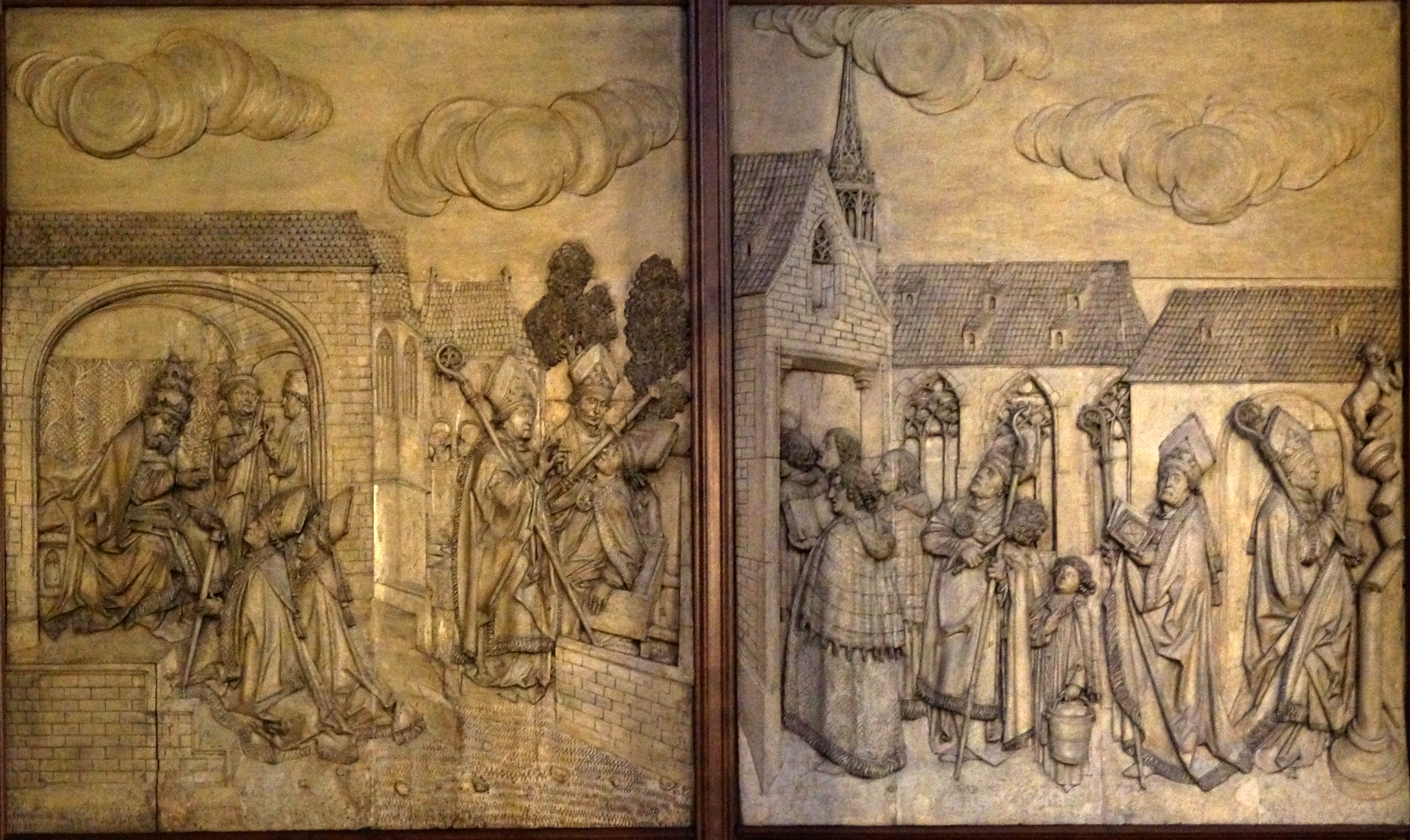 détail de Cycle de la Passion du Christ (St-Pierre-le-Vieux, Strasbourg).